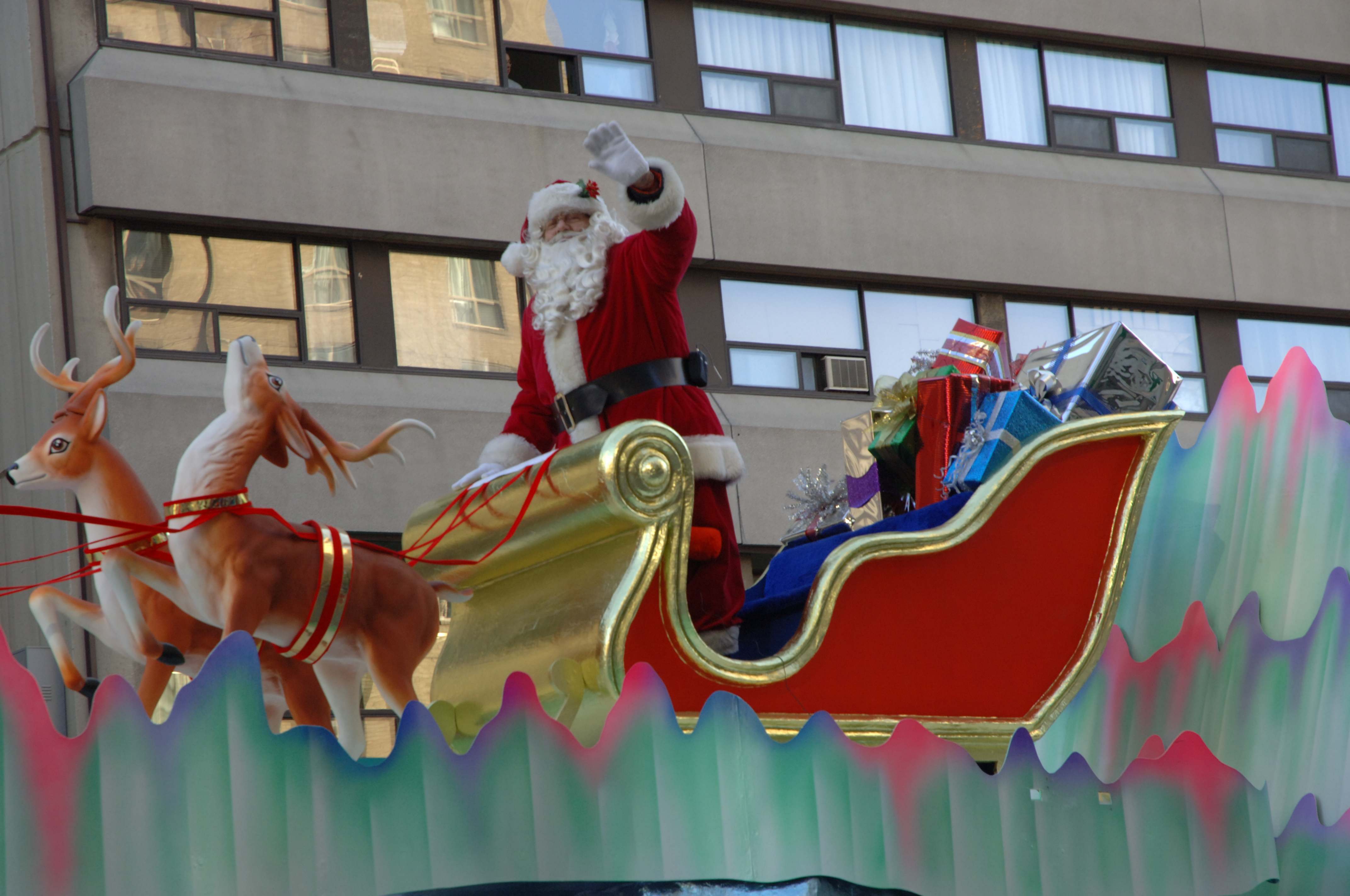 Santa Claus in parade, in Toronto